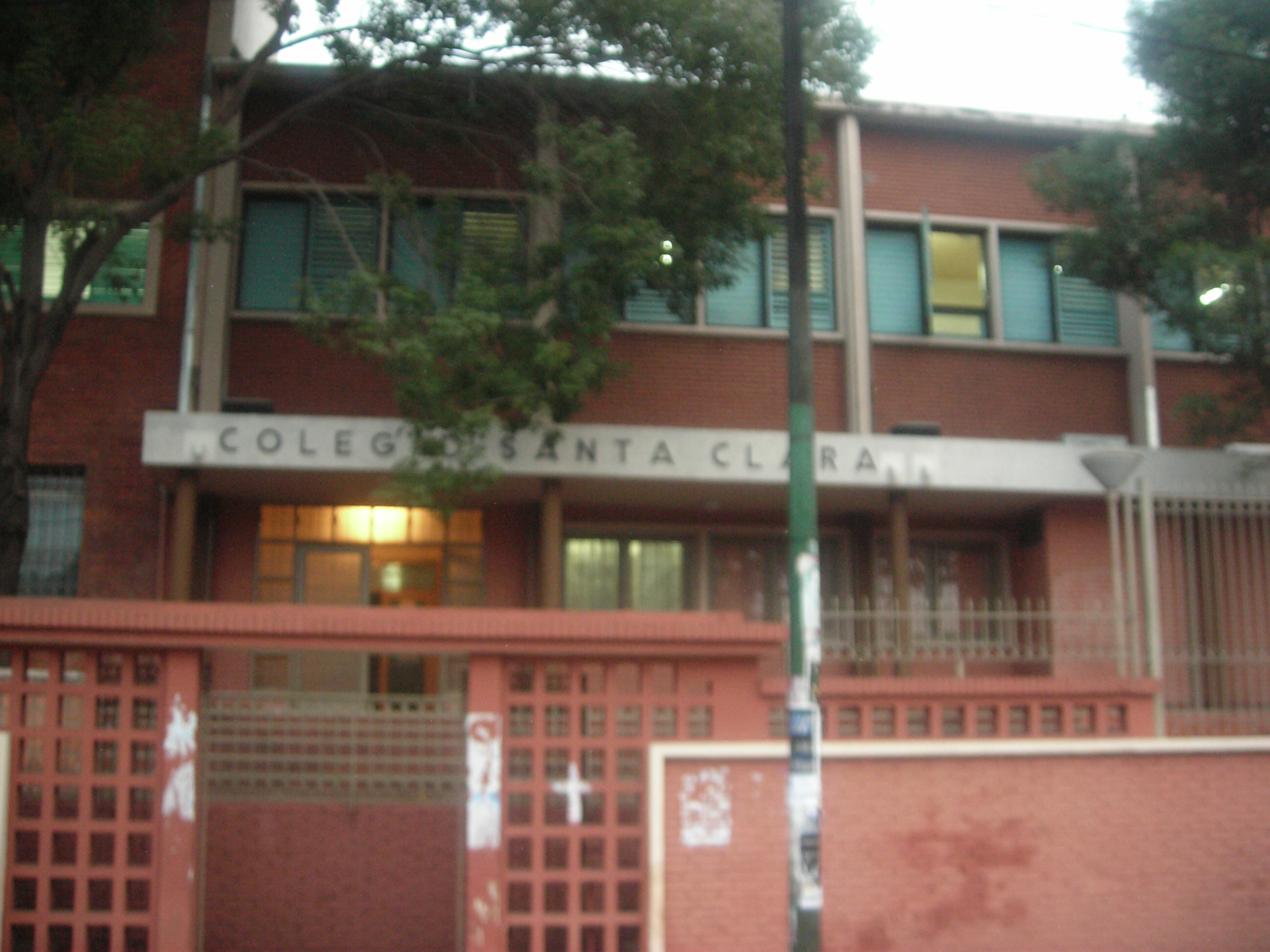 colegio